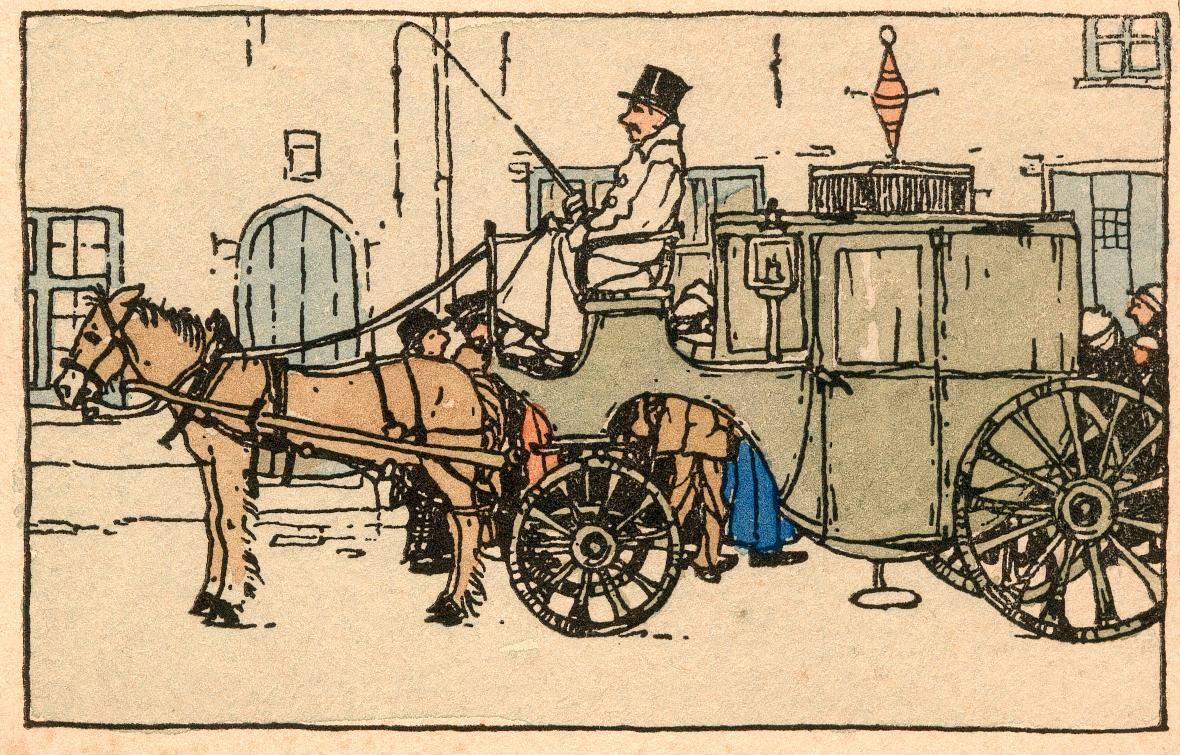 Jules Fonteyne, gekleurde tekening van een Brugse koetsier